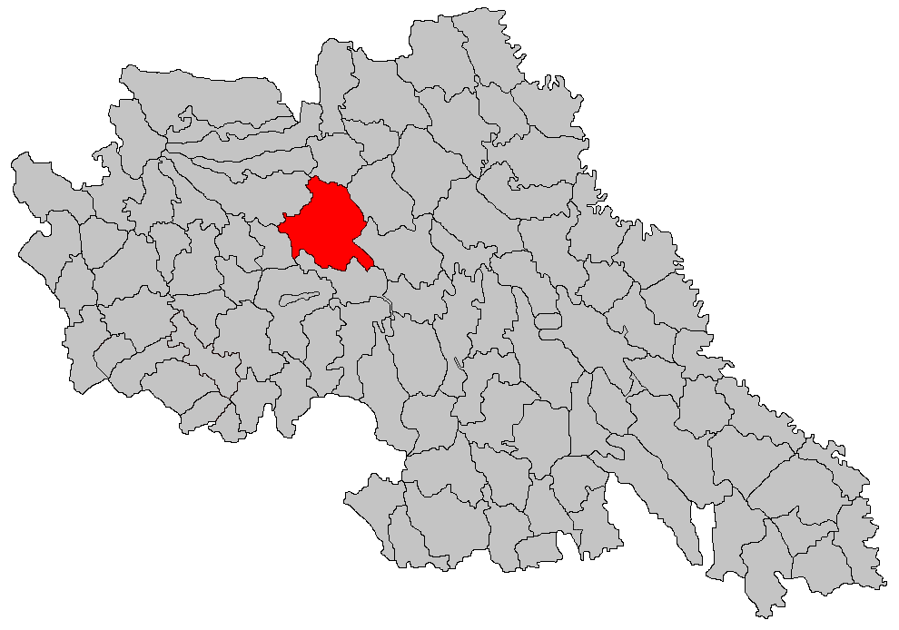 Categorie:Hărţi ale judeţului Iaşi